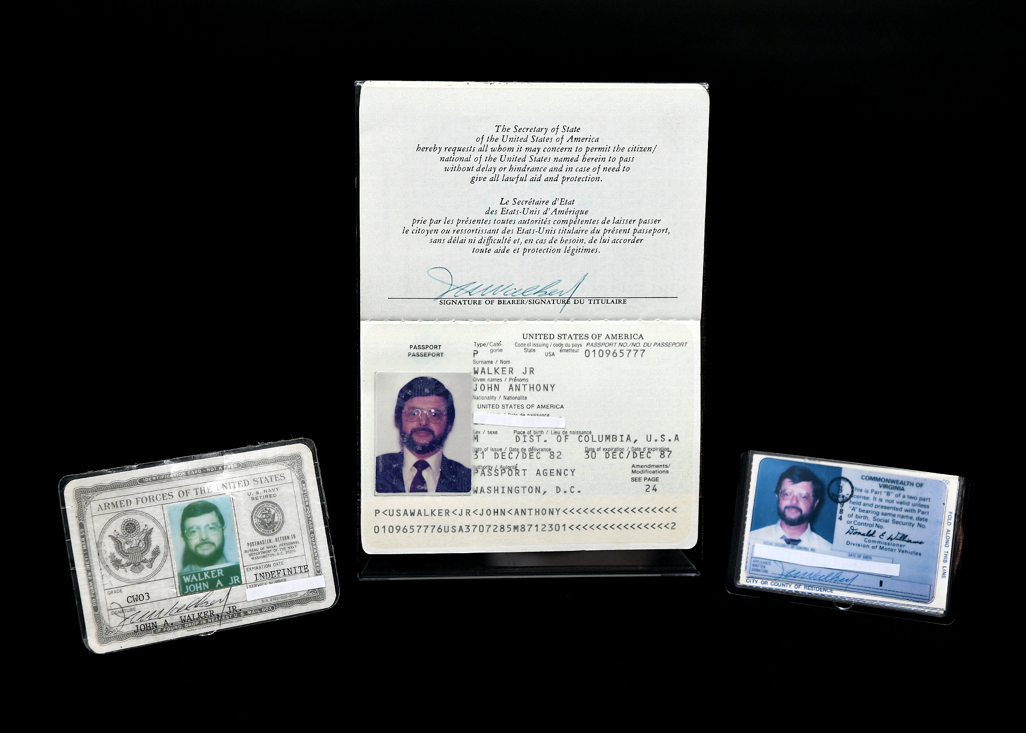 Photo du passeport, du permis de conduire et de la carte d'identité de l’US Navy de John Anthony Walker (ces documents sont actuellement détenus par le FBI)